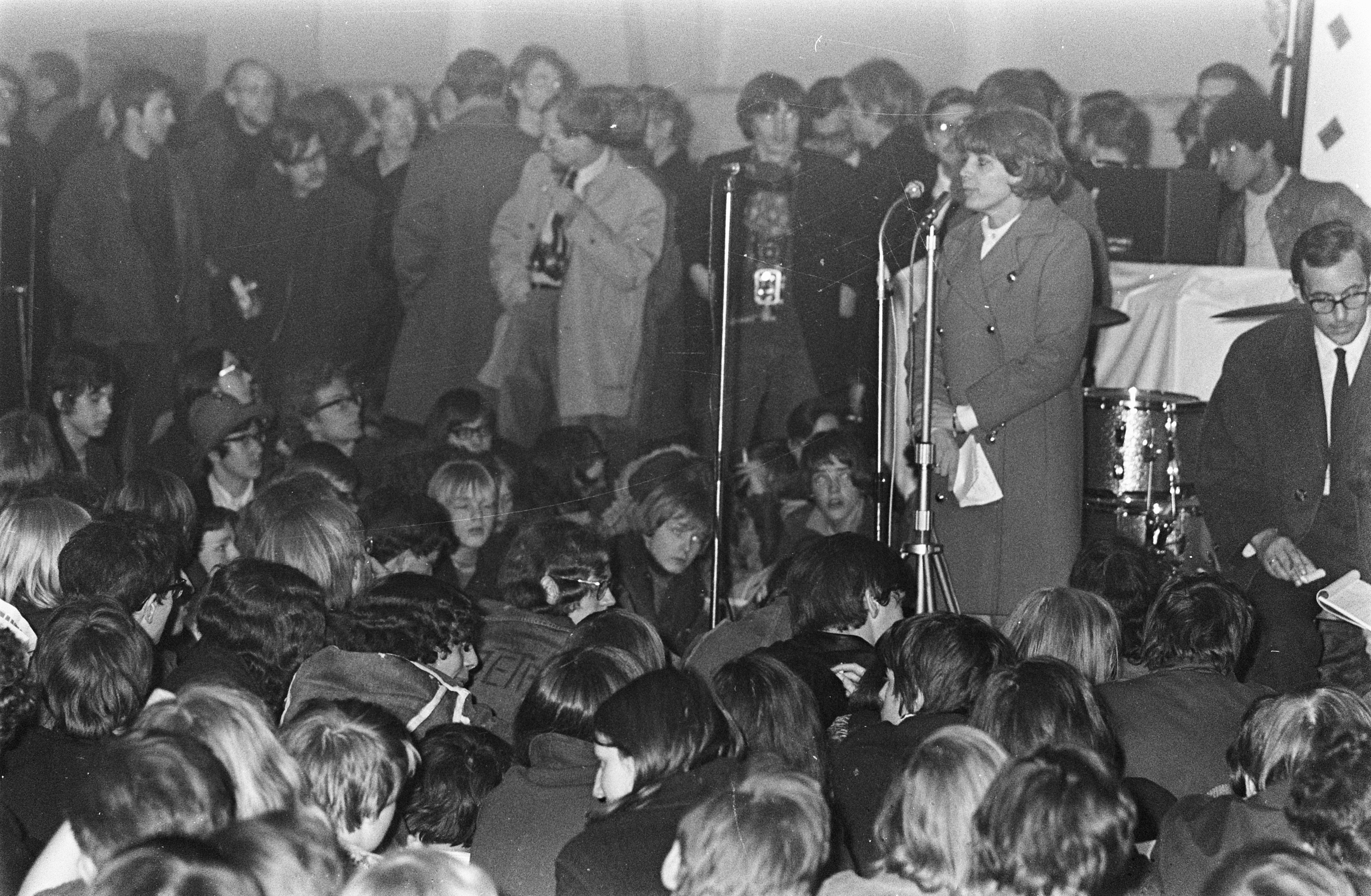 Collectie / Archief : Fotocollectie Anefo Reportage / Serie : [ onbekend ] Beschrijving : "Walk in Talk in" in oude RAI. De Franse-Tunesische advocate en feministisch activiste Gisèle Halimi temidden van toehoorders Datum : 5 april 1968 Locatie : Amsterdam, Noord-Holland Trefwoorden : culturele manifestaties, feminisme Persoonsnaam : Halimi, Gisèle Instellingsnaam : RAI Fotograaf : Kroon, Ron / Anefo, [onbekend] Auteursrechthebbende : Nationaal Archief Materiaalsoort : Negatief (zwart/wit) Nummer archiefinventaris : bekijk toegang 2.24.01.05 Bestanddeelnummer : 921-2307